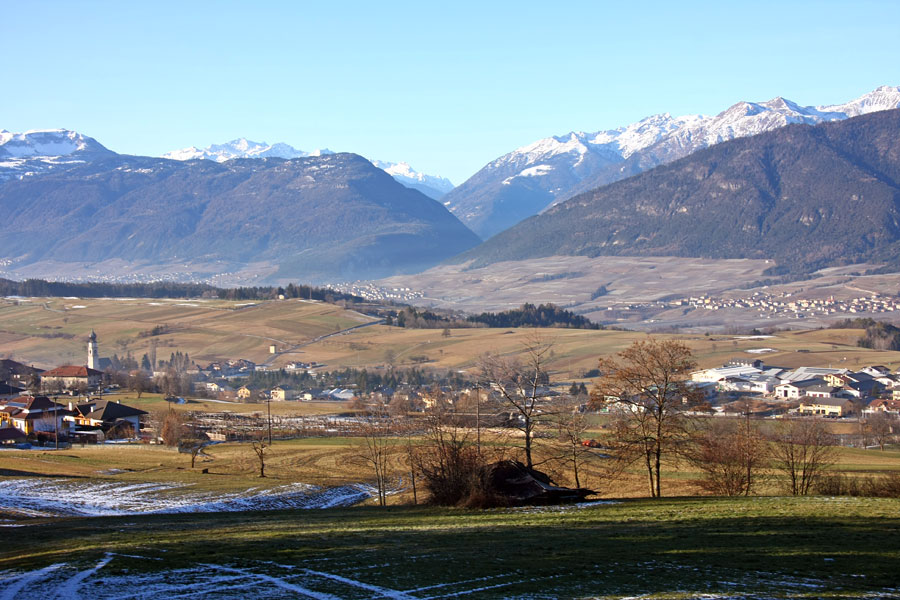 Panorama della Val di Non da Ronzone (TN)